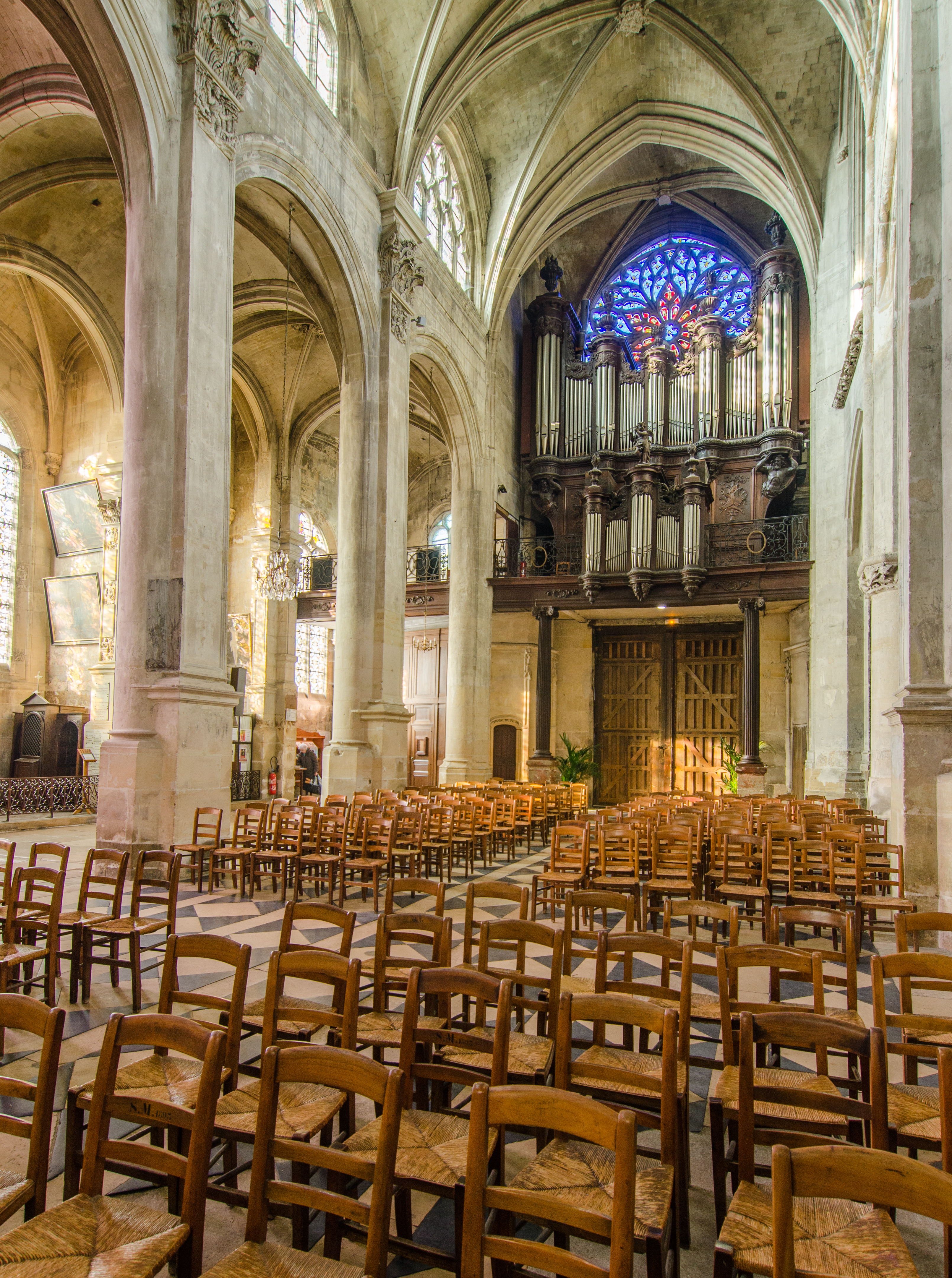 Nef et orgue de la cathédrale Saint Maclou de Pontoise (Val-d'Oise, France).